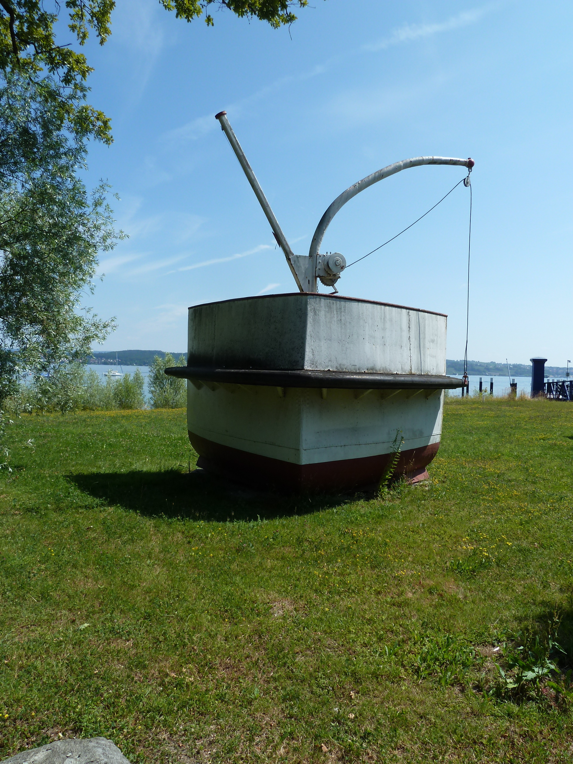 Das Kreuzerheck der 2002 verschrotteten Allgäu mit Flaggstock und Davit beim Fährhafen Staad